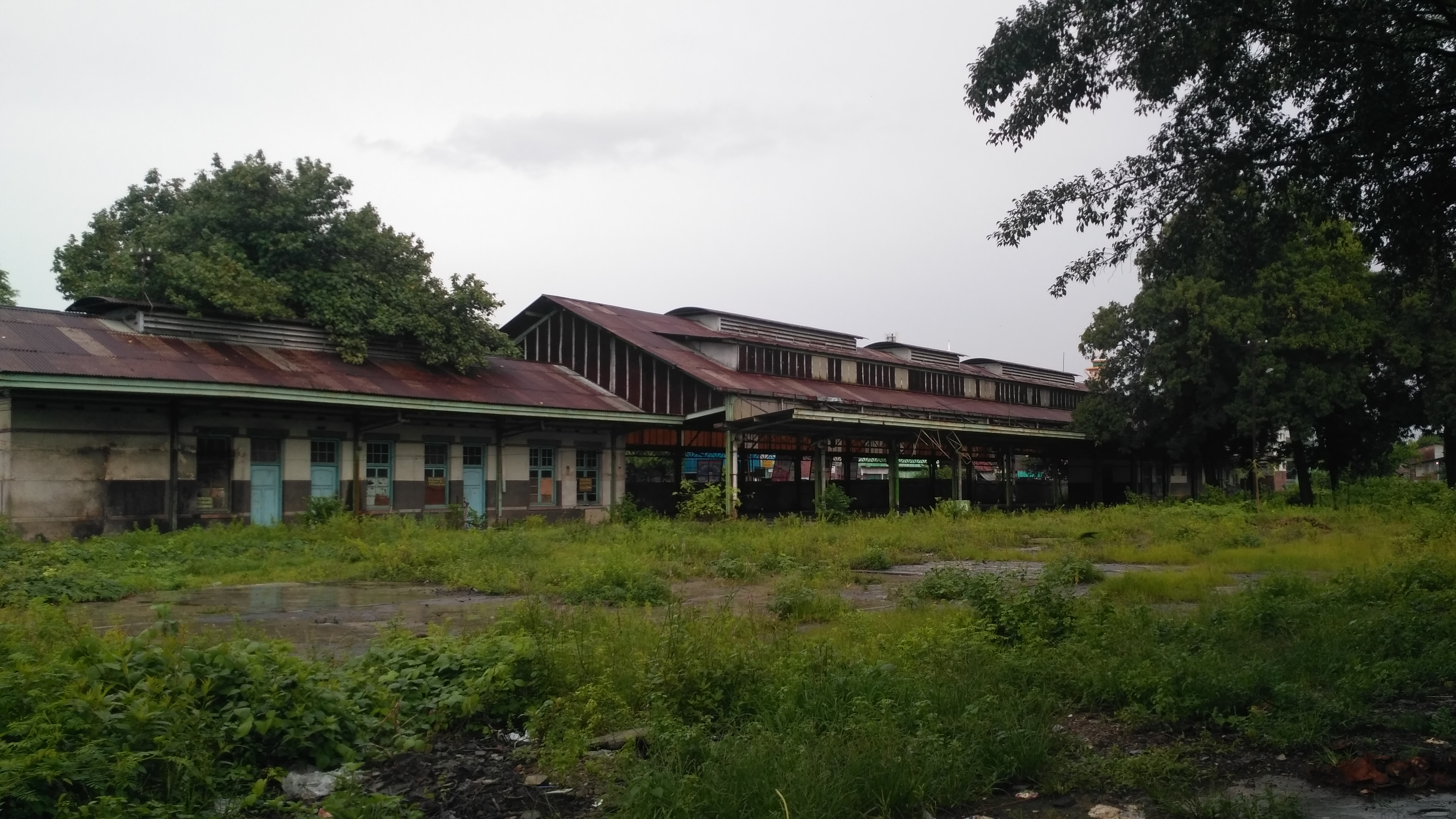 Fasad perspektif bangunan Stasiun Kudus yang telah dinonaktifkan sejak tahun 1986